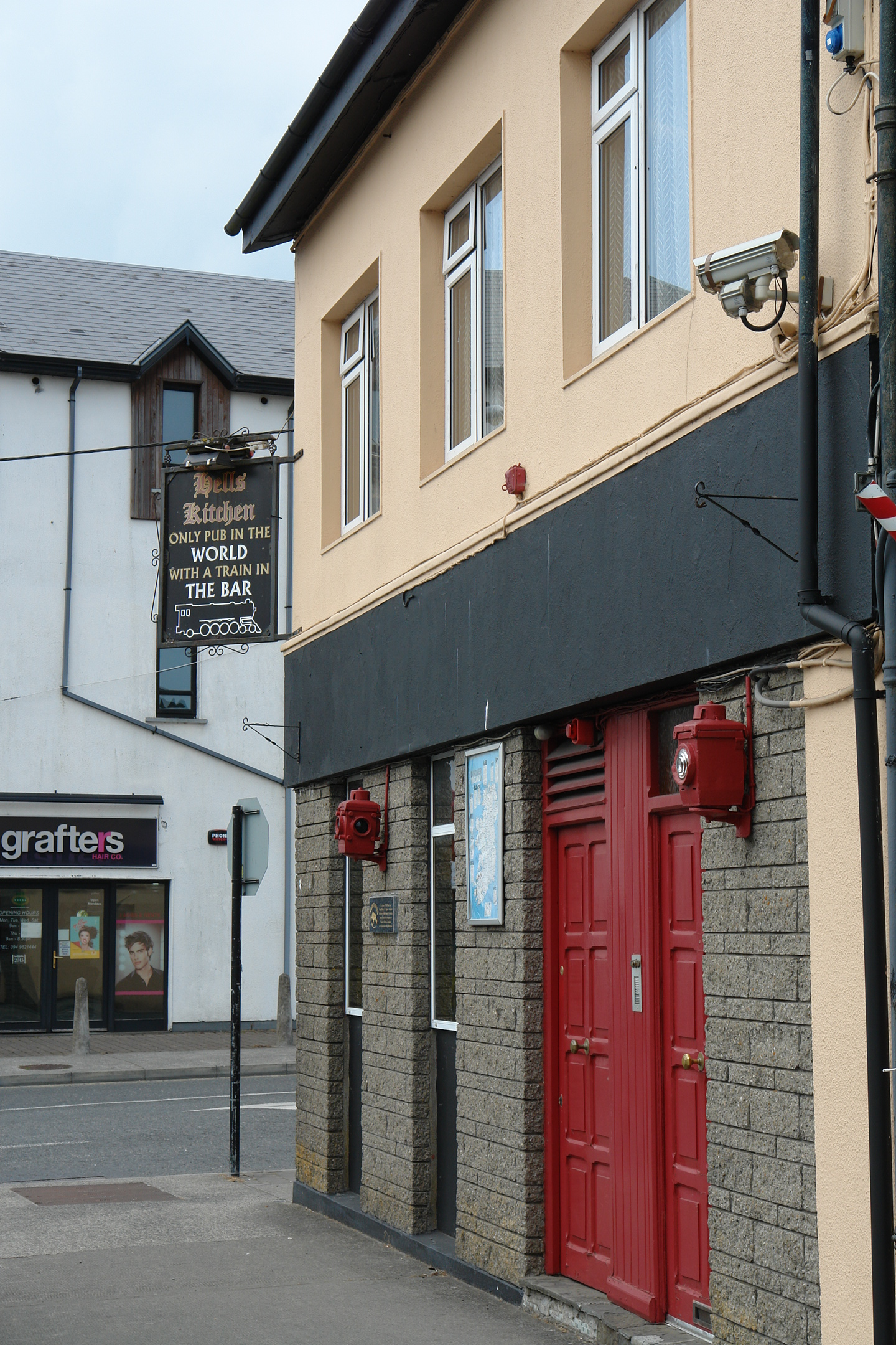 Hells Kitchen Bar and Railway Museum in Castlerea, County Roscommon, Ireland